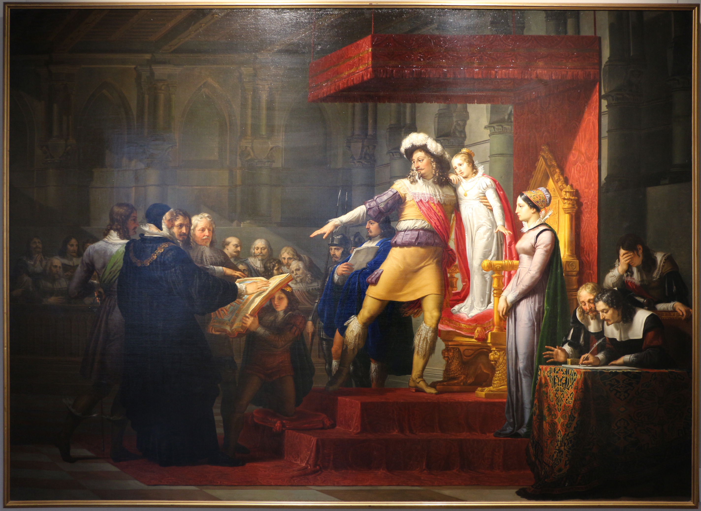 Paintings in the Civica galleria d'arte moderna (Milan) This is a photo of a monument which is part of cultural heritage of Italy.